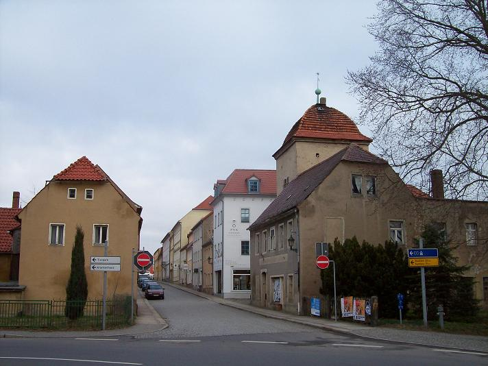 Ehemaliges Dresdner Tor mit Fronfeste in Bischofswerda